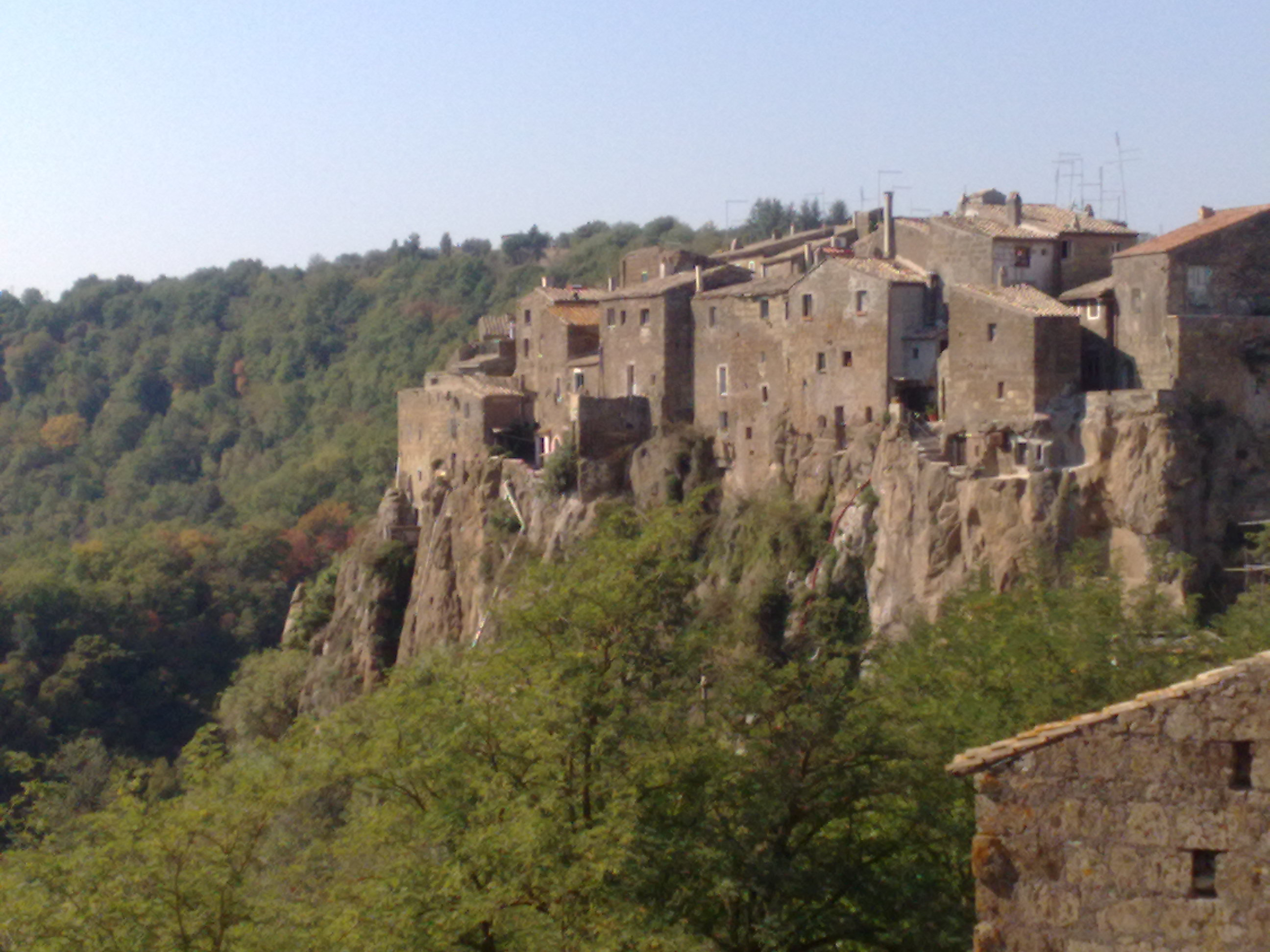 calcata viterbo italy